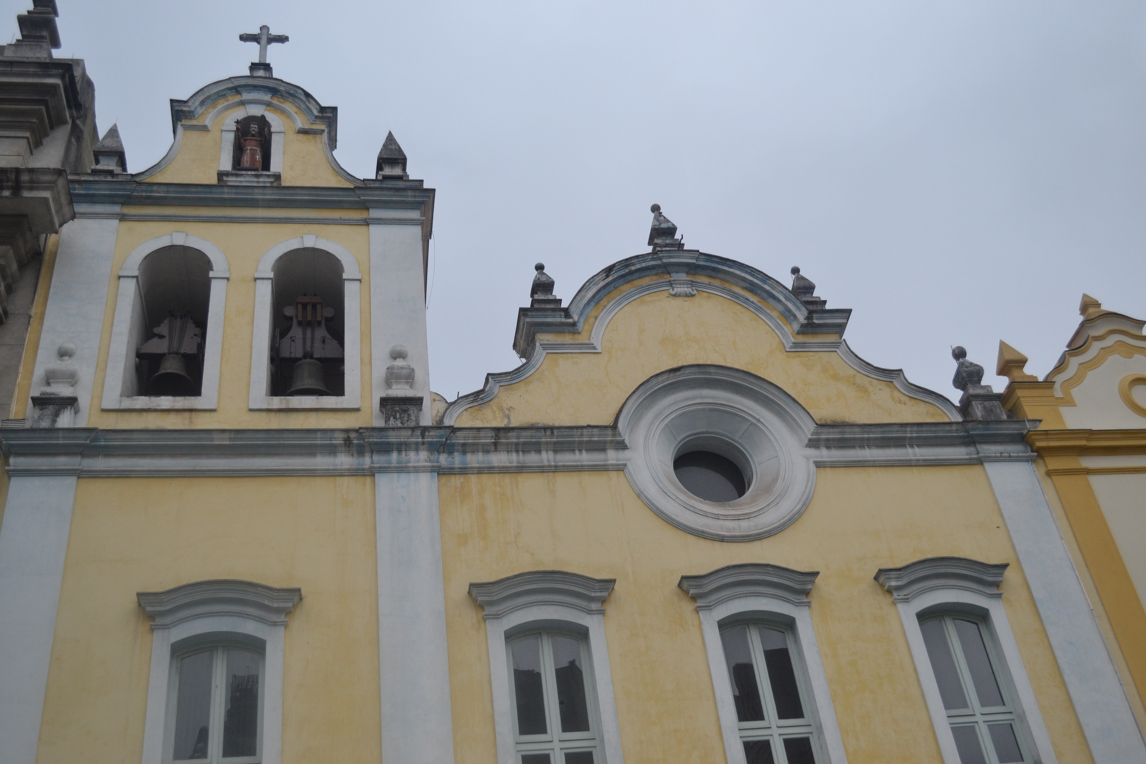 Detalhes da fachada da Igreja de São Francisco, em São Paulo (SP), Brasil.